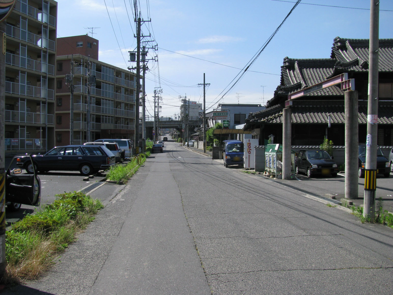 伊賀鉄道桑町駅